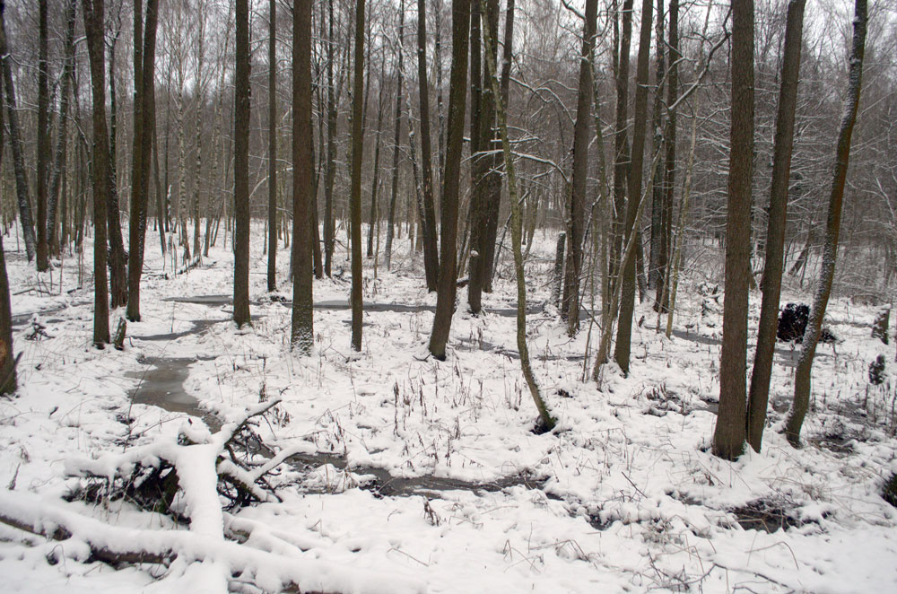 Ульяновский лесопарк - черноольшаник в пойме Екатерининского ручья